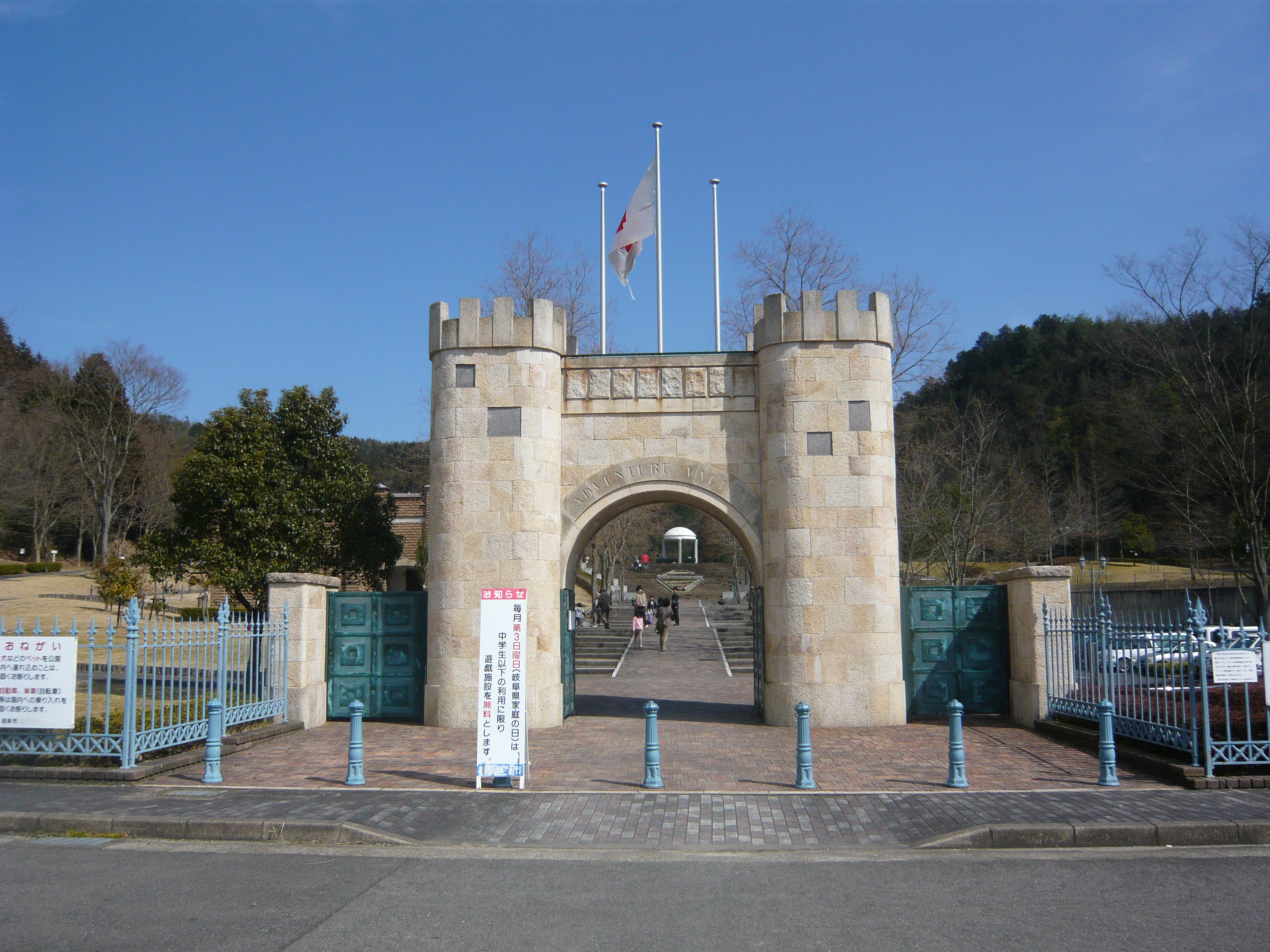 Gifu Family Park こどもゾーン入口（岐阜ファミリーパーク）,Gifu,Gifu,Japan（岐阜県岐阜市）で撮影。